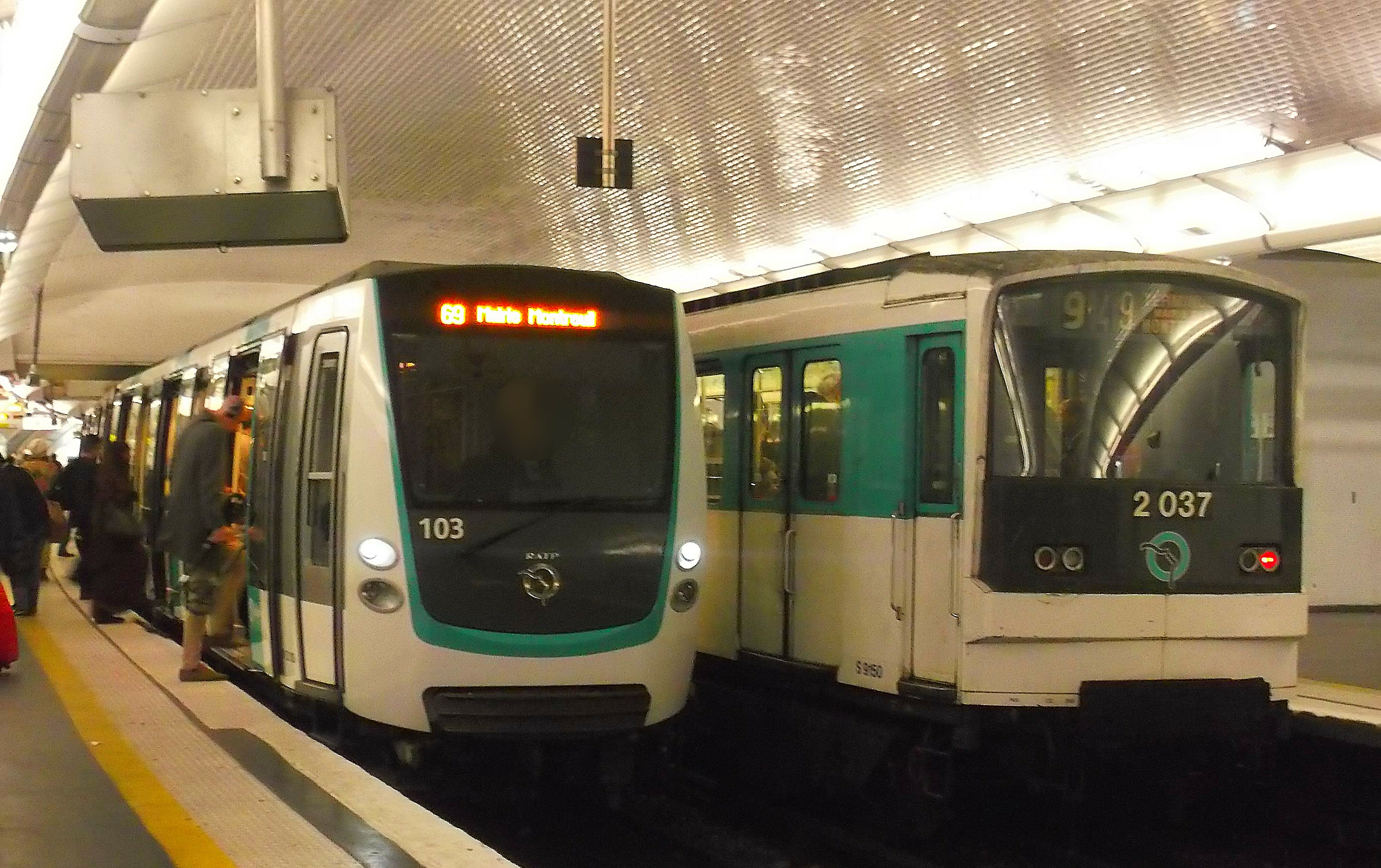 MF01 & MF01